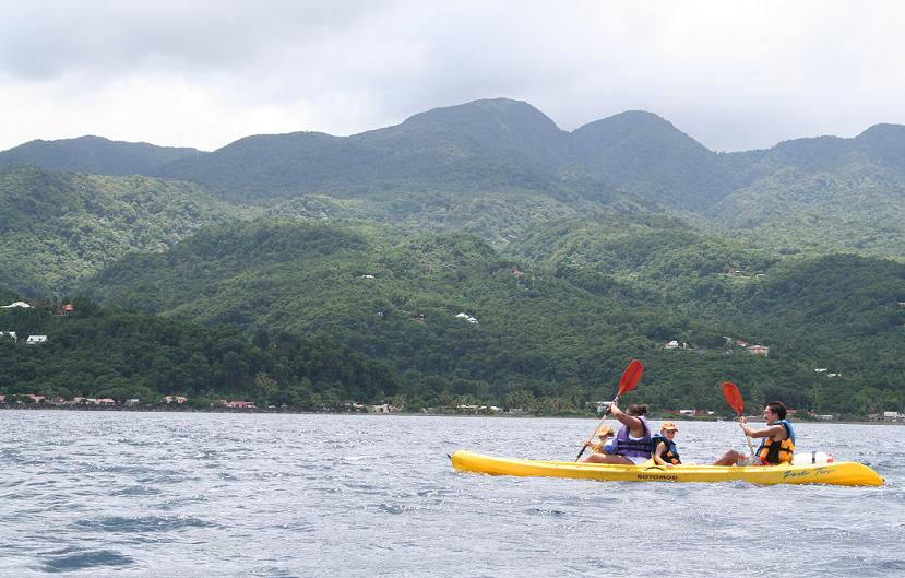 Je suis l'auteur de cette photo Kayak de mer - Plage de Malendure, Pigeon - Guadeloup - Aout 2006.JPG